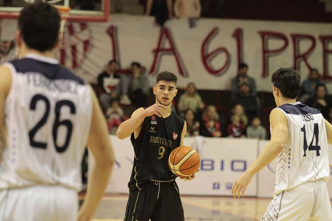 Foto de Nahuel Buchaillot jugando al Baketball en Instituto de Cordoba (I.A.C.C.)